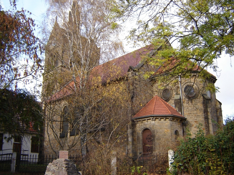 St.-Sebastian-Kirche Magdeburg-Lemsdorf, Südansicht